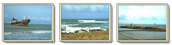 Puerto Escondido, Paraguaná